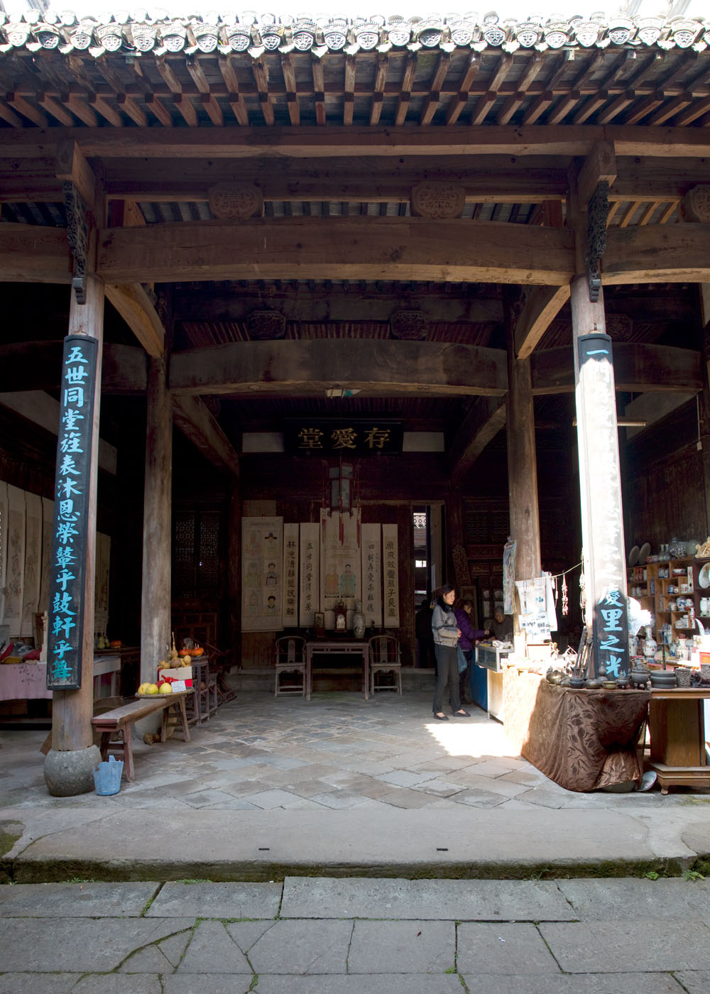 棠樾村——存爱堂（五世同堂）